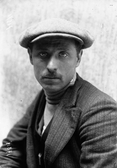 Paris-Roubaix 1919 : Lucien Buysse